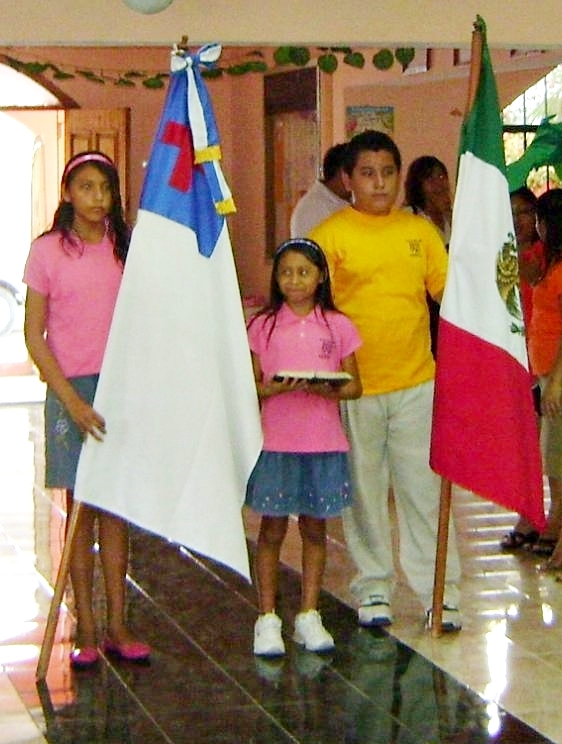 Niños cristianos con una bandera cristiana y la bandera de México, evento Escuela Bíblica de Vacaciones en el Templo Monte de Sion, Cancún, Q. Roo (Asambleas de Dios Mexico)